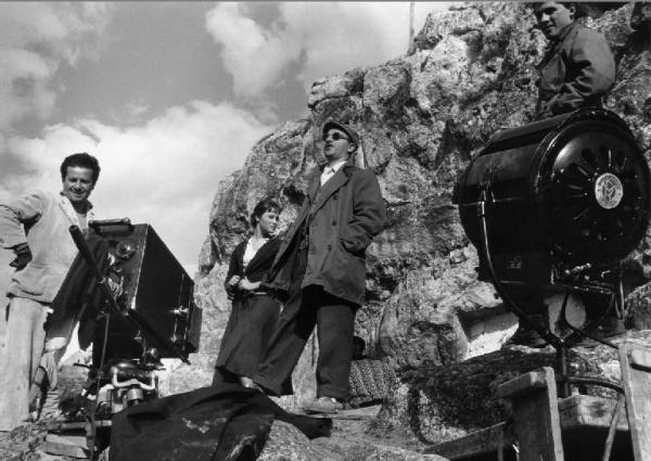 Matera - Alberto Lattuada e l'attrice May Britt sul set del film "La lupa" di Alberto Lattuada